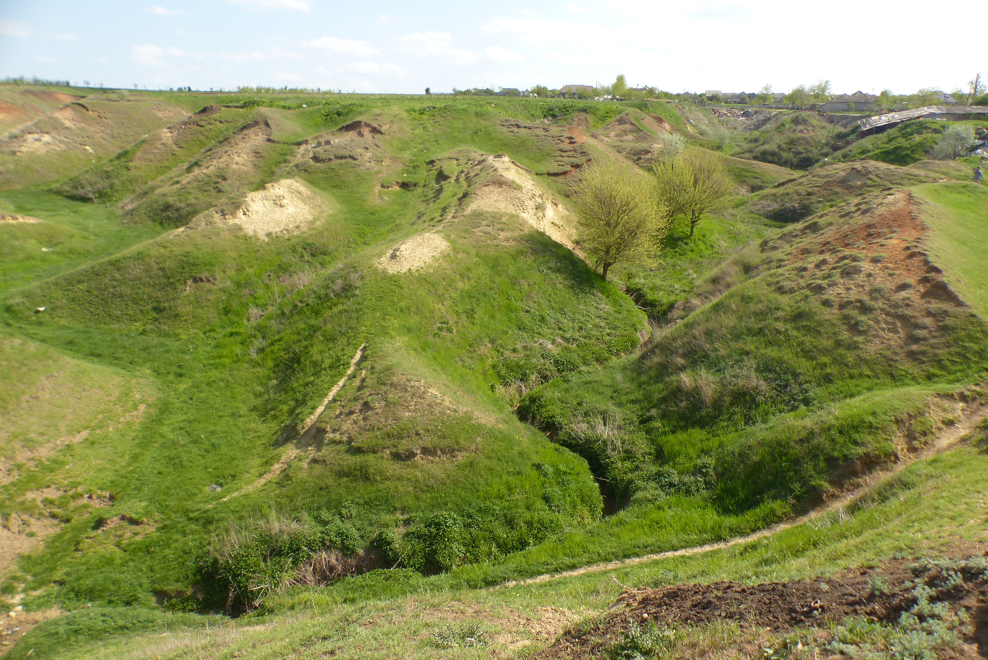 marginea satului Copceac, în vâlcea